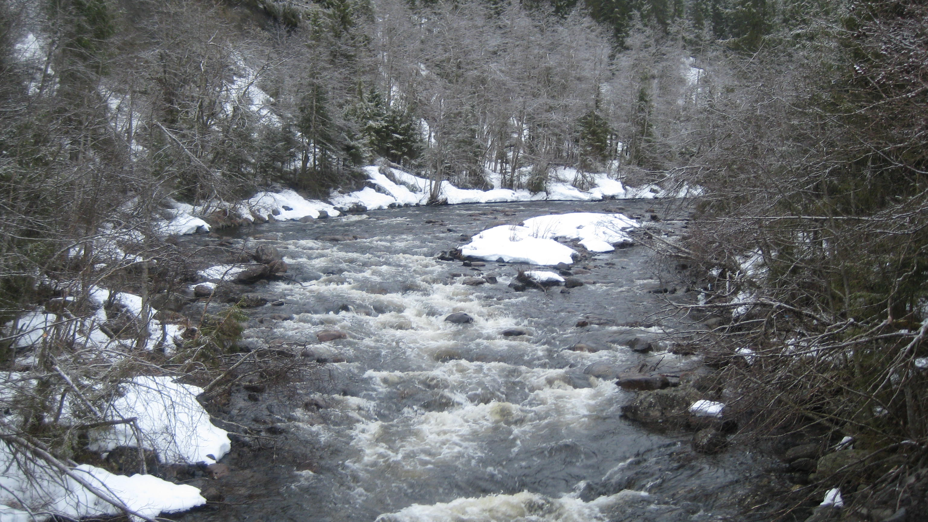 Bildet tatt rett ovenfor samløpet med Livasselva